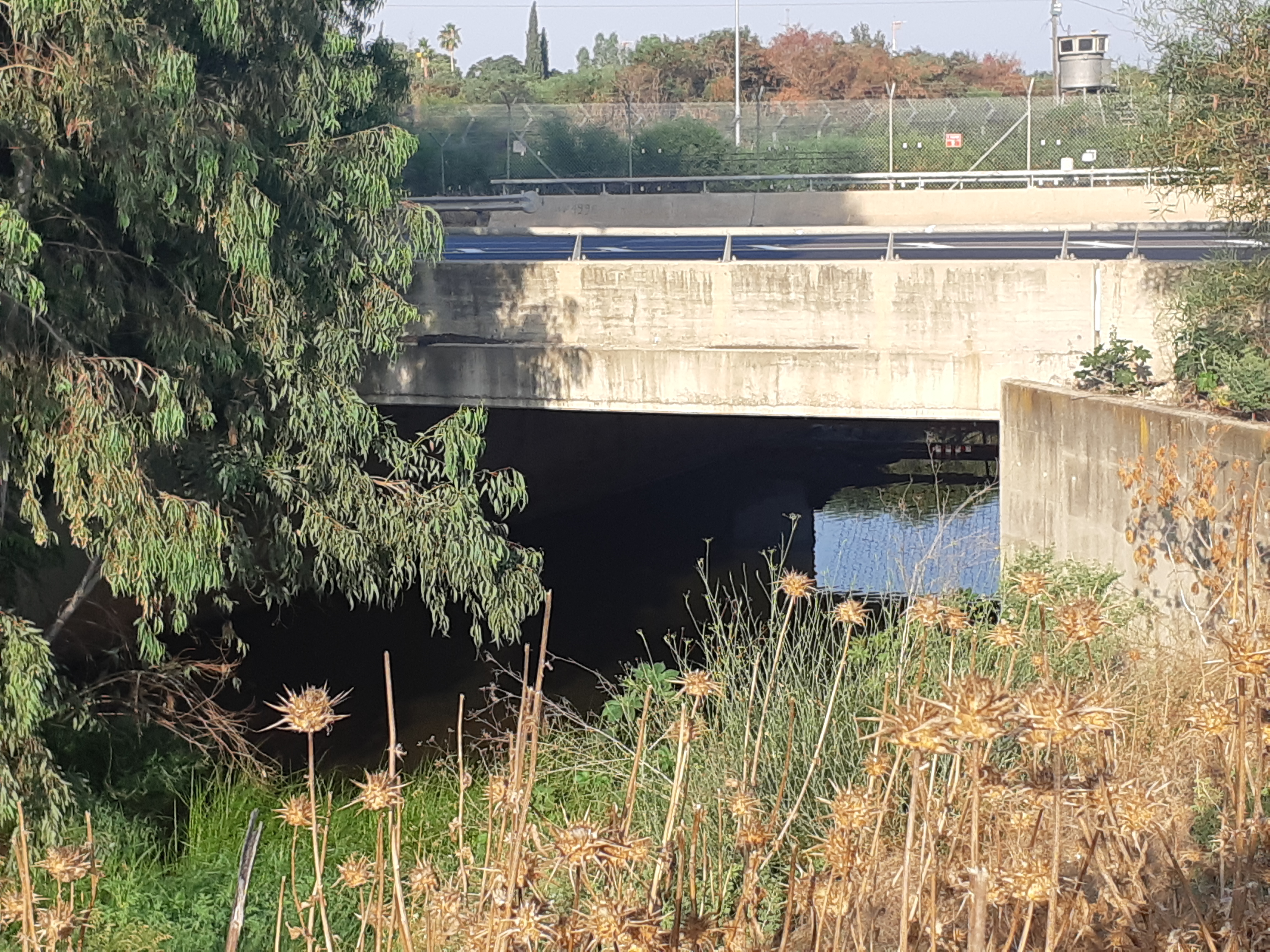 גשר כביש 40 מעל נחל בית עריף. קרוב לצומת בדק.